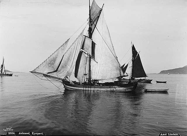 Hardangerjakt på fjorden ved Ålesund